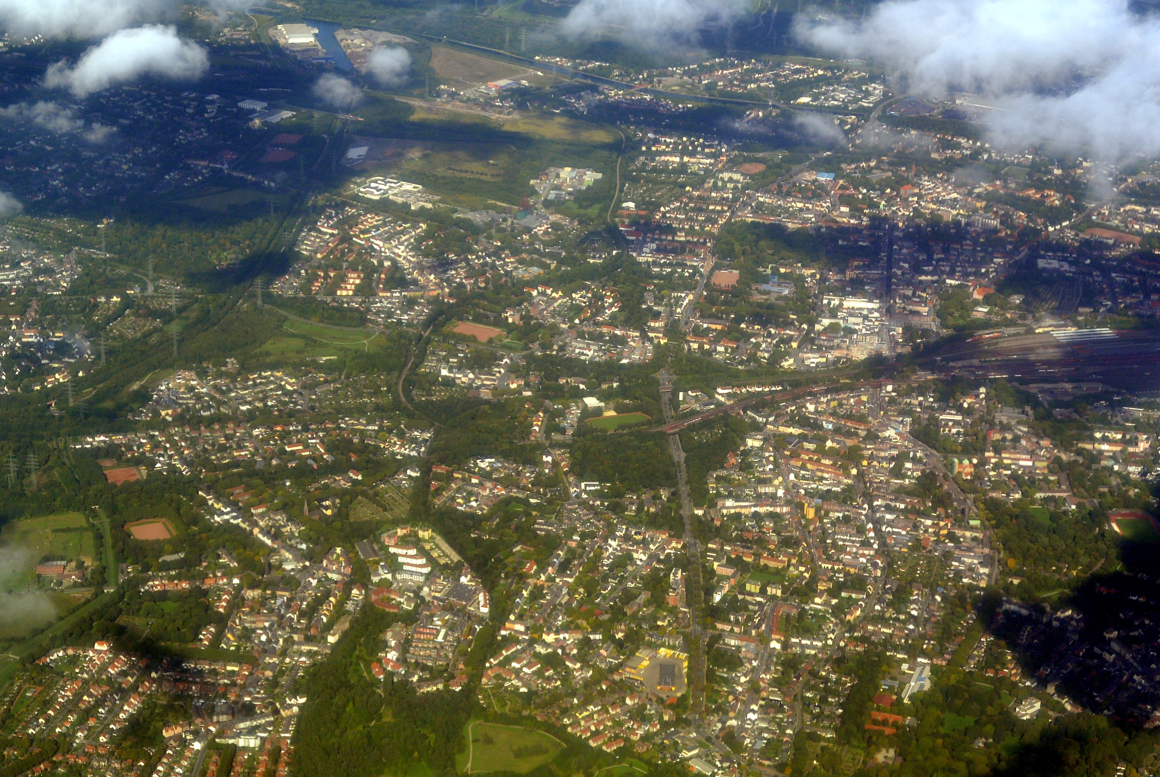 Wanne-Eickel zwischen Wanne-Eickel Hbf und der Stadtgrenze Gelsenkirchen,bzw. zwischen der A42 und der Grenze nach Bochum